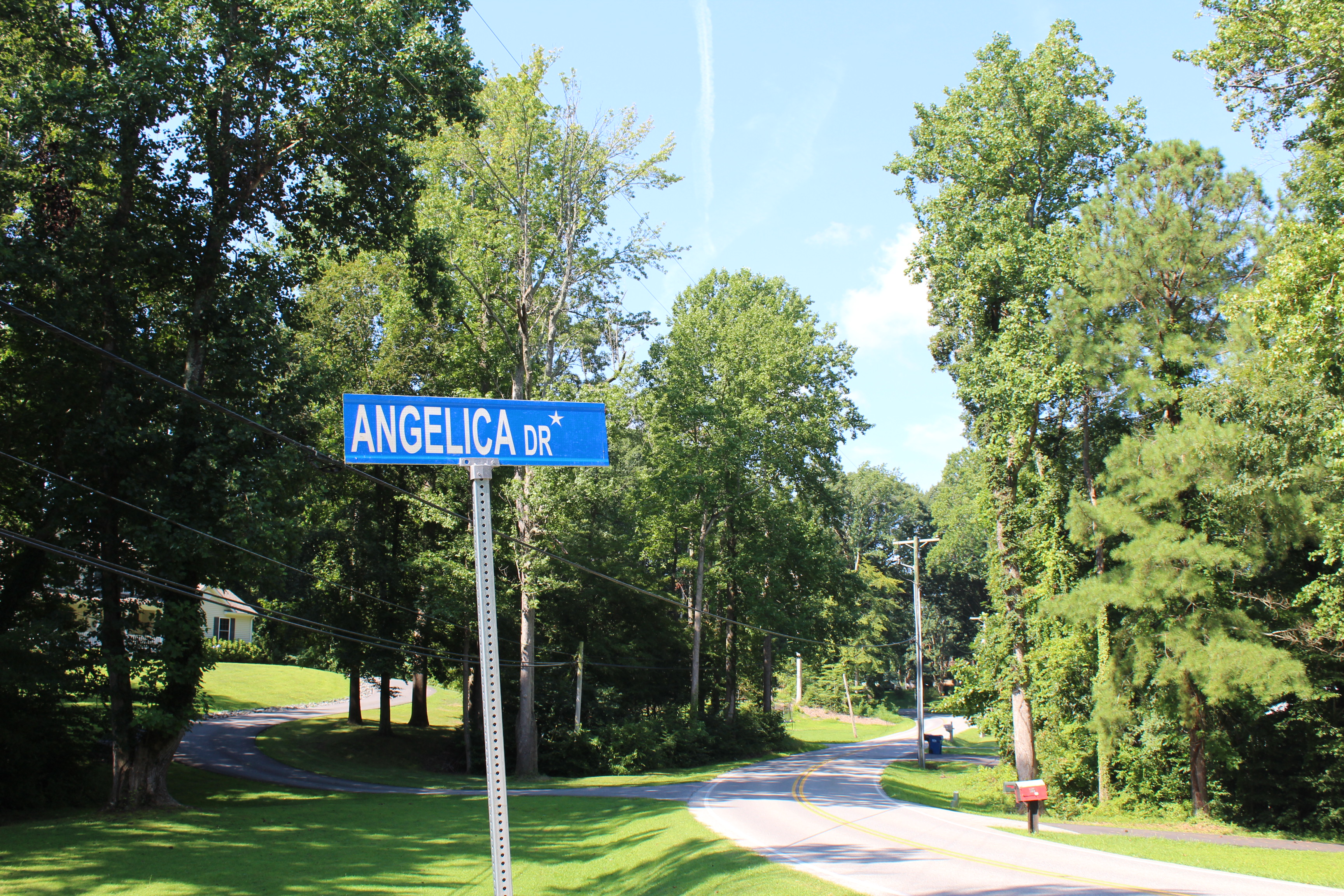 Foto de la escritora Angélica Sátiro.